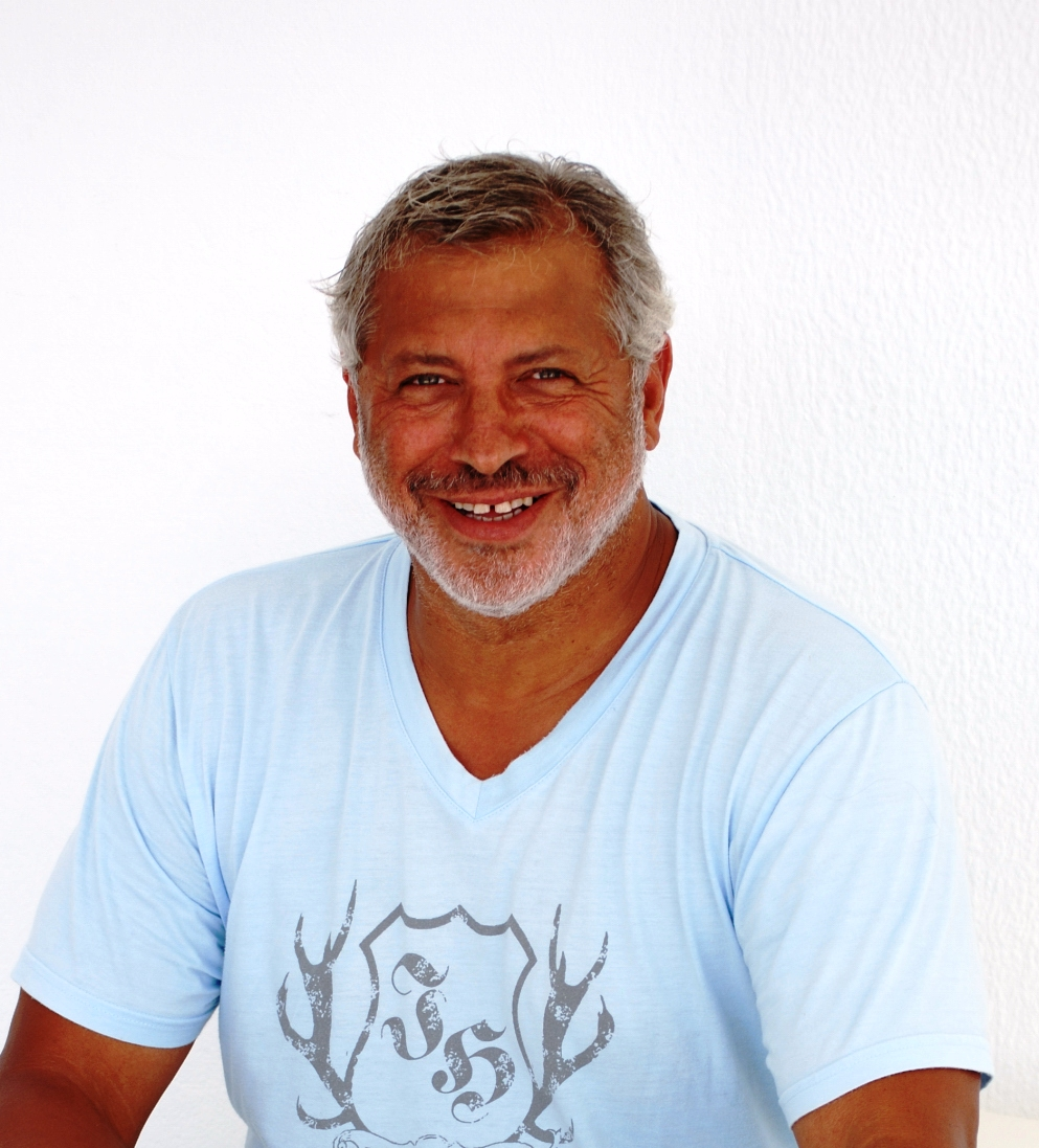 Jimmy Hartwig privat